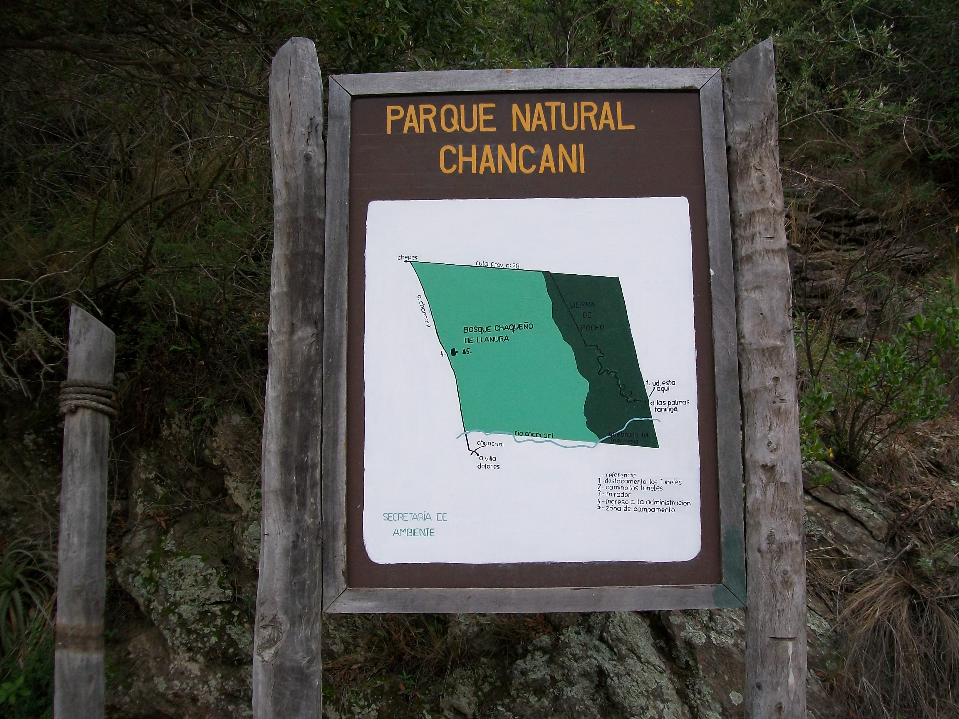 Palmares naturales en la zona no agrícola de la Pampa de Pocho, Traslasierra, Córdoba, Argentina